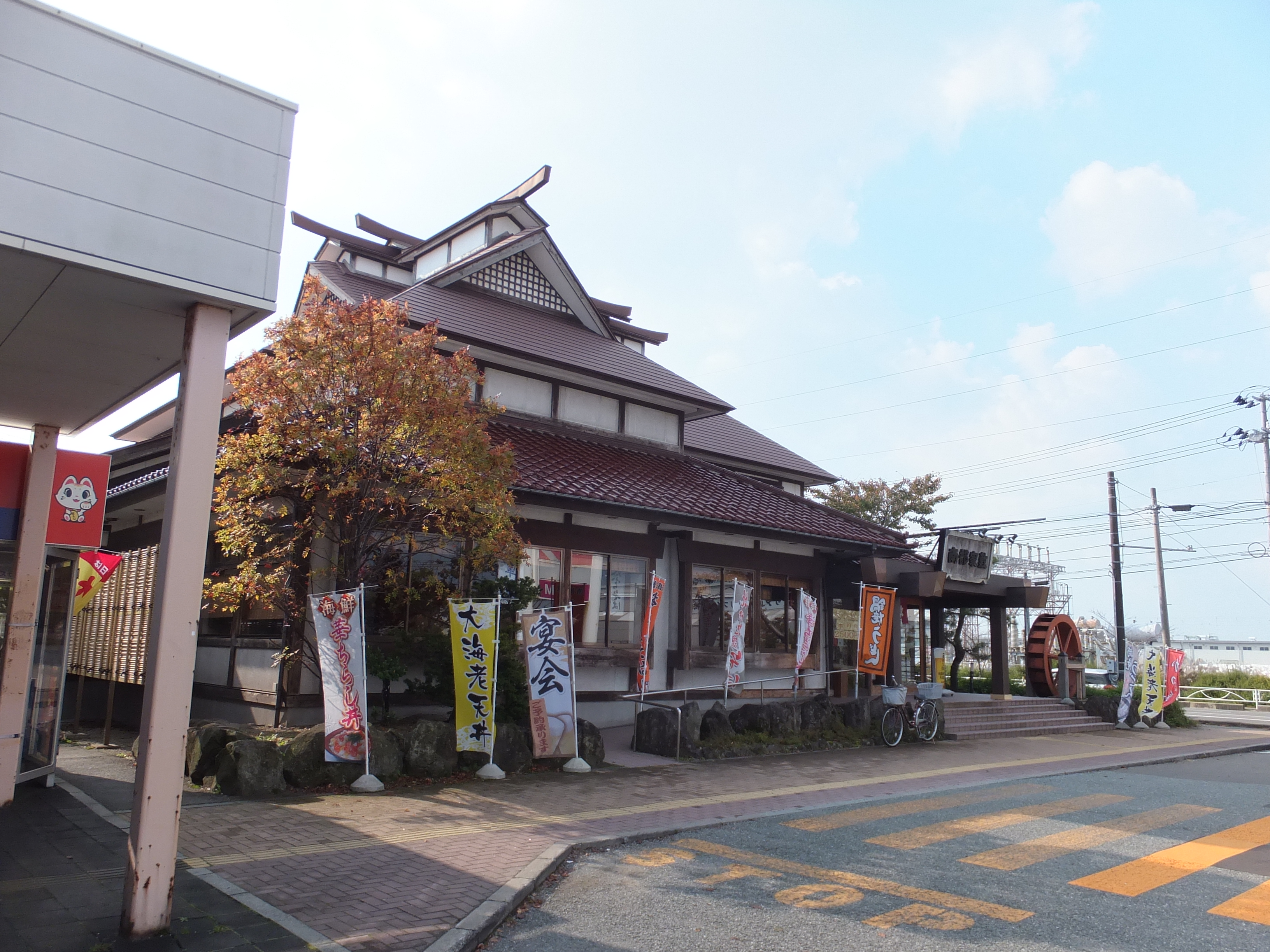 イオンタウン茨島パワーセンター内、南部家敷茨島店（秋田市茨島）